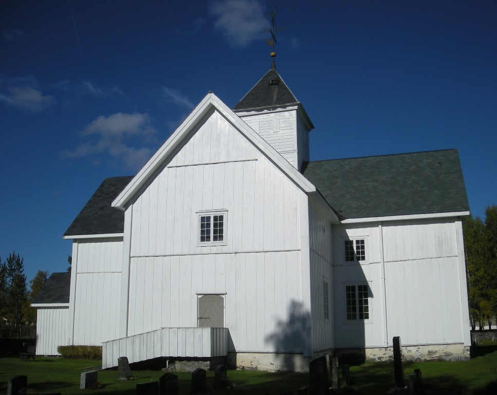 Vestre Gausdal kirke